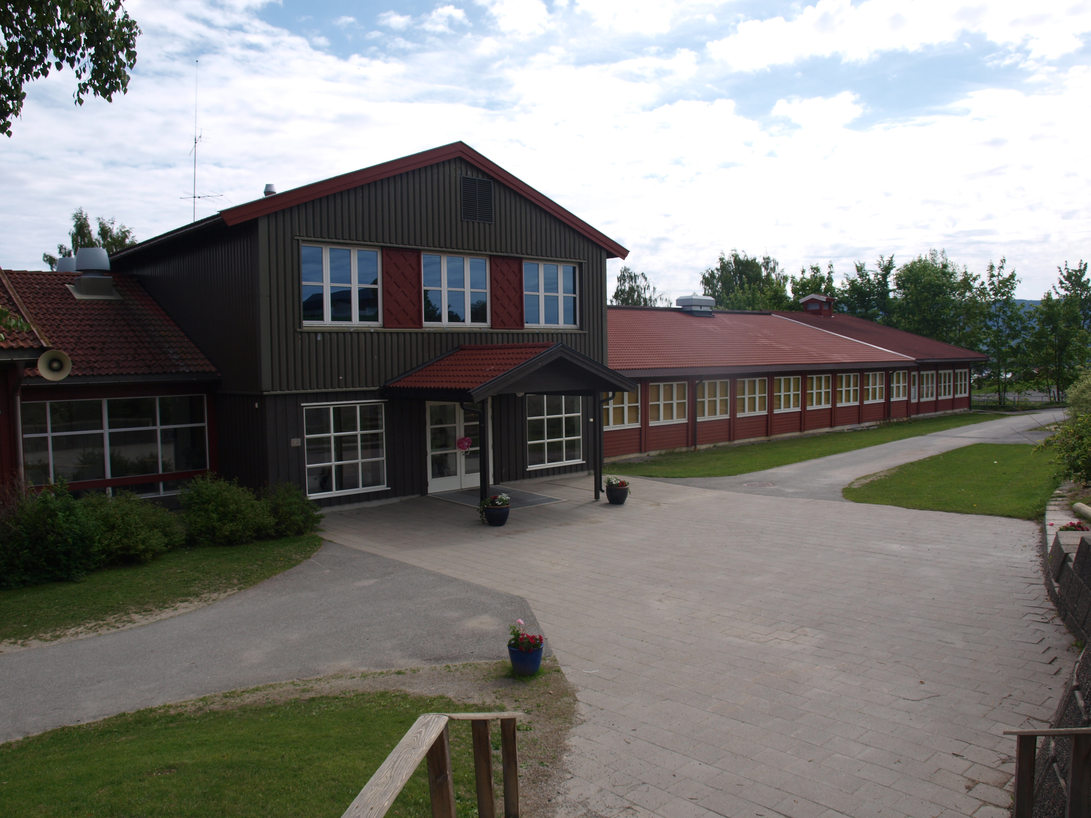 Røyse skole i Hole kommune i Buskerud.